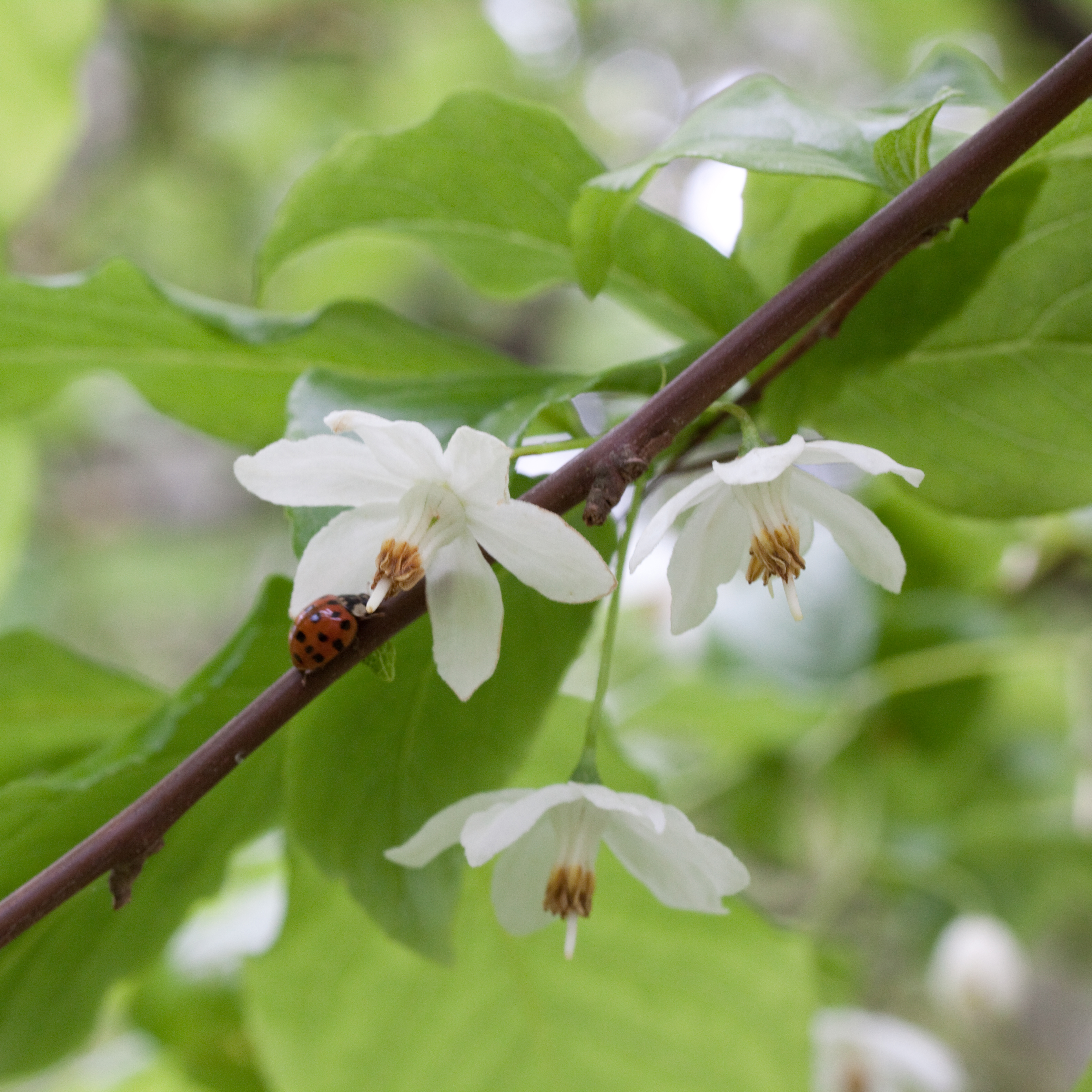 Fleurs de Sinojackia rehderiana - Jardin botanique de Strasbourg - France